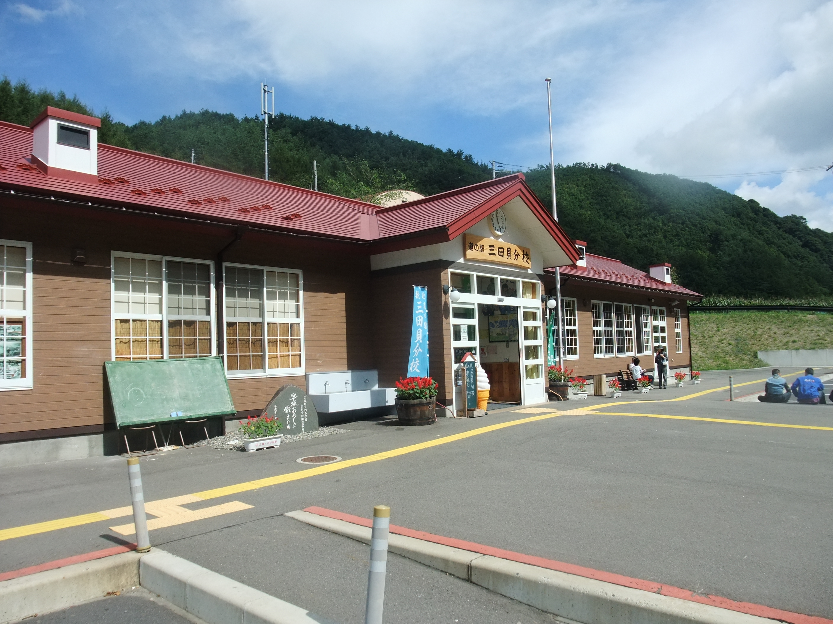 道の駅三田貝分校（国道455号）